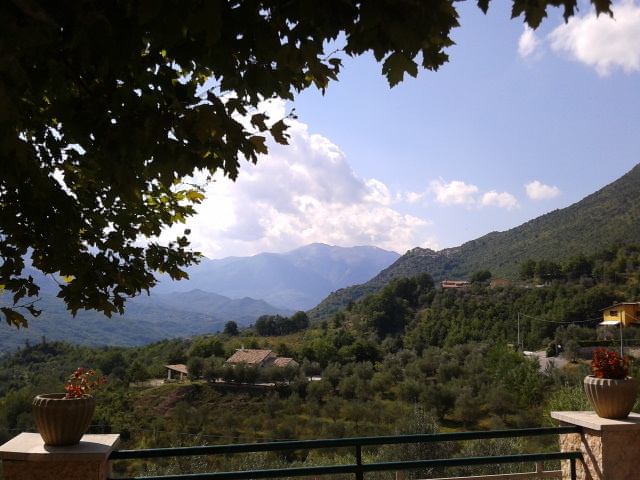 Panoramica da San Vincenzo Superiore